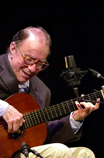 Joao Gilberto durante il concerto tenuto a Umbria jazz nel 1996